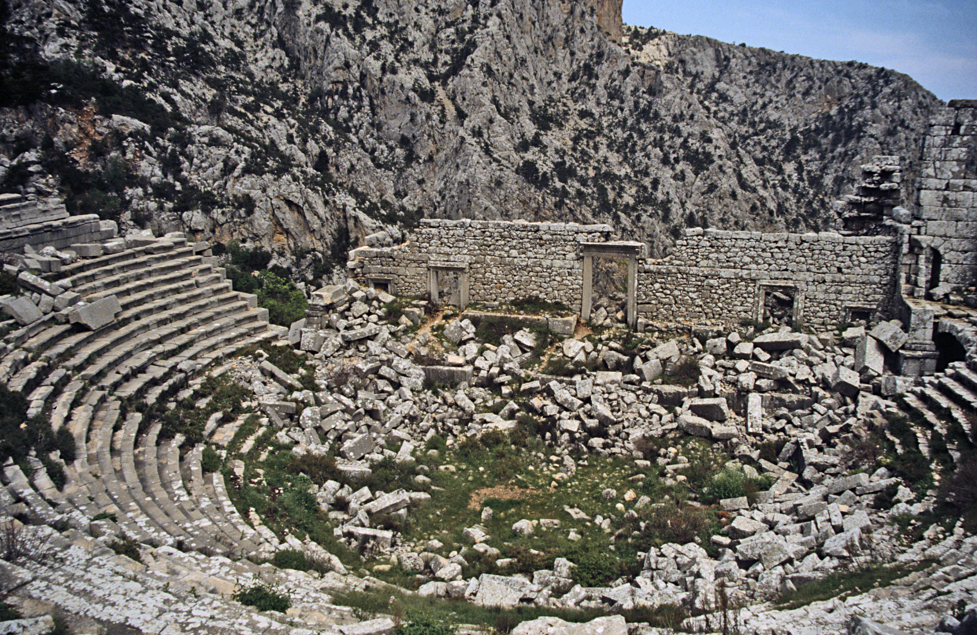 Termessos, Südtürkei, Theater